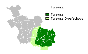 Made by nds-Gebruker:Grönneger 1